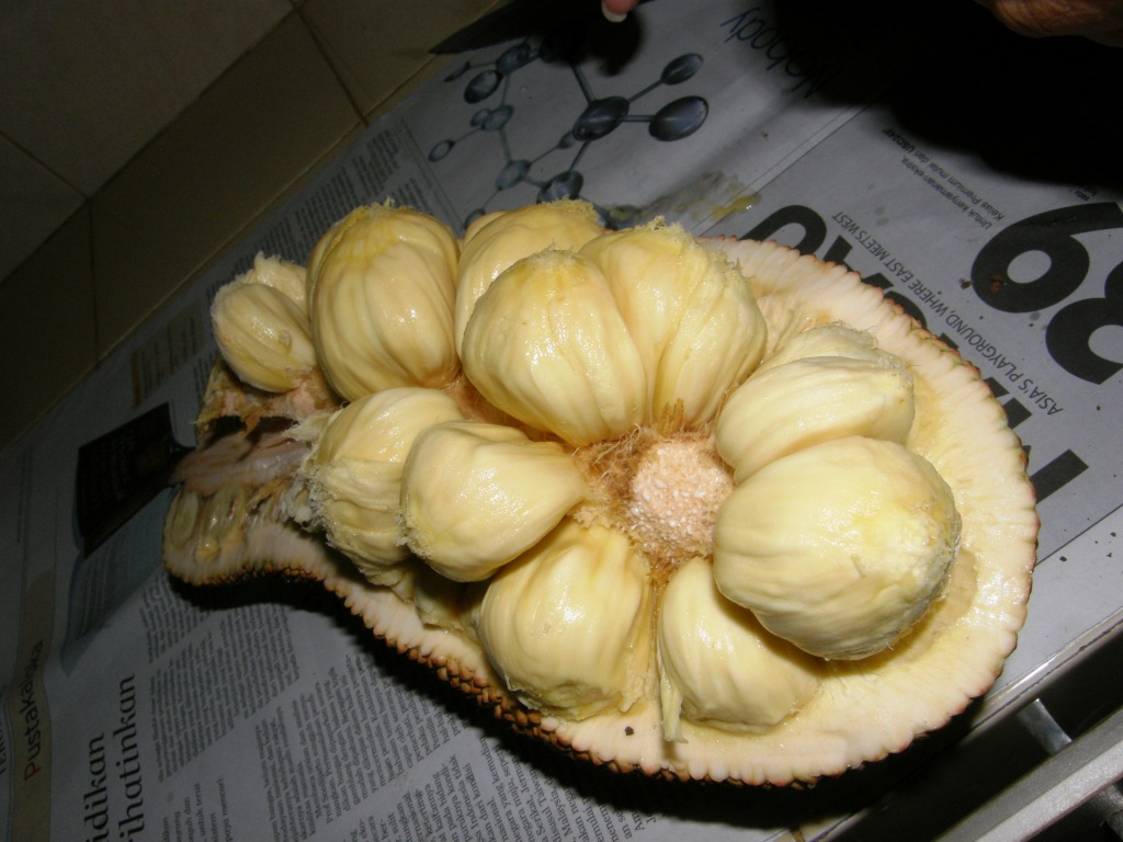 Artocarpus integer, Frucht geöffnet